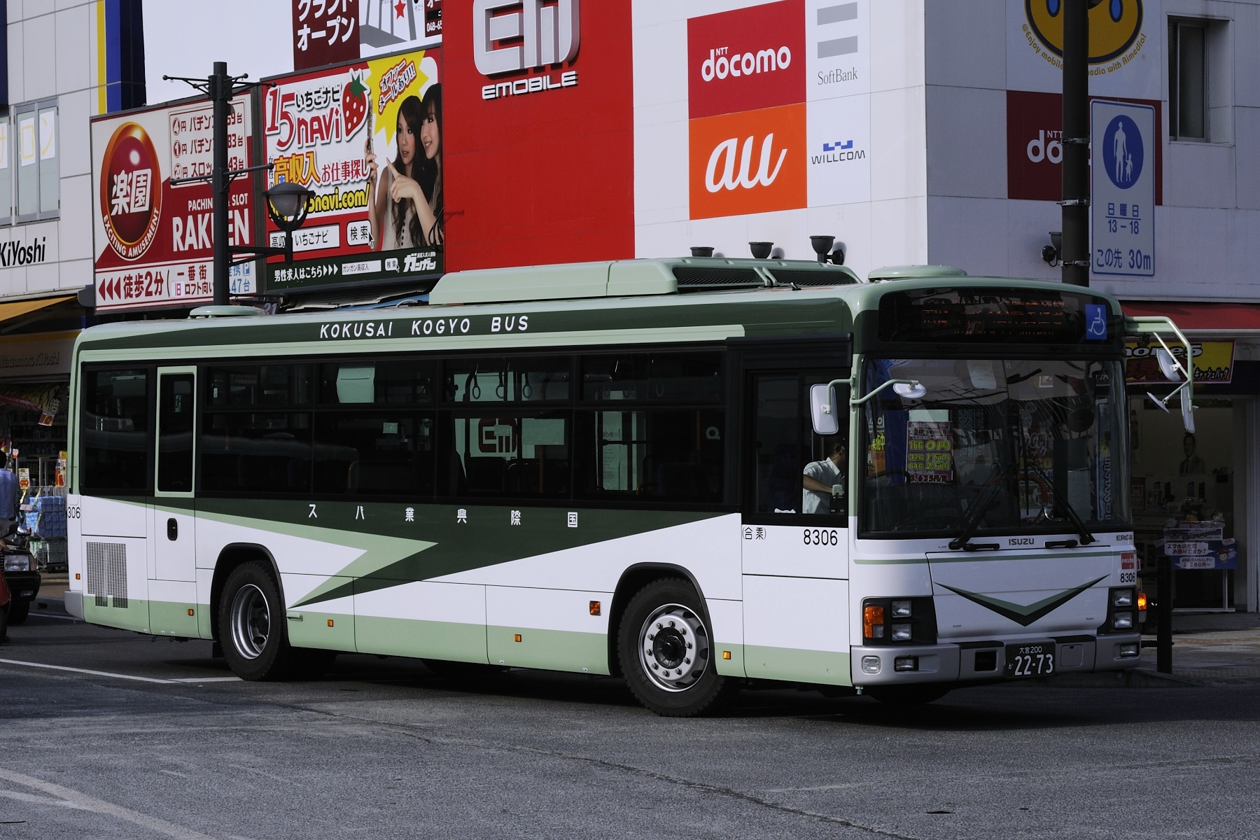 国際興業バスさいたま東営業所8306号車、大04運用